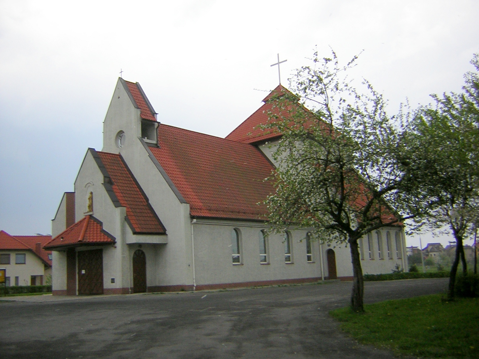 Iława, ul. Lipowy Dwór 1 - rzymskokatolicki kościół parafialny p.w. św. Andrzeja Boboli. Autor: Marcin n® ☼ 12:44, 14 June 2006 (UTC)